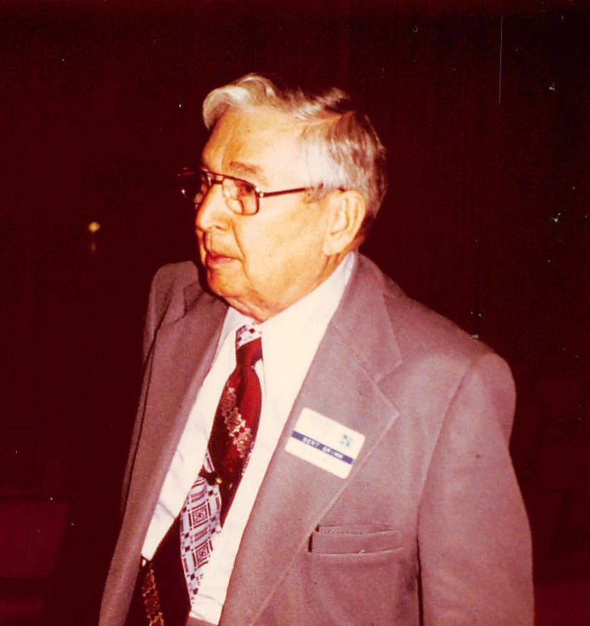 Der Tätowierer Bert Grimm auf der Tattoo-Convention in Reno 1982